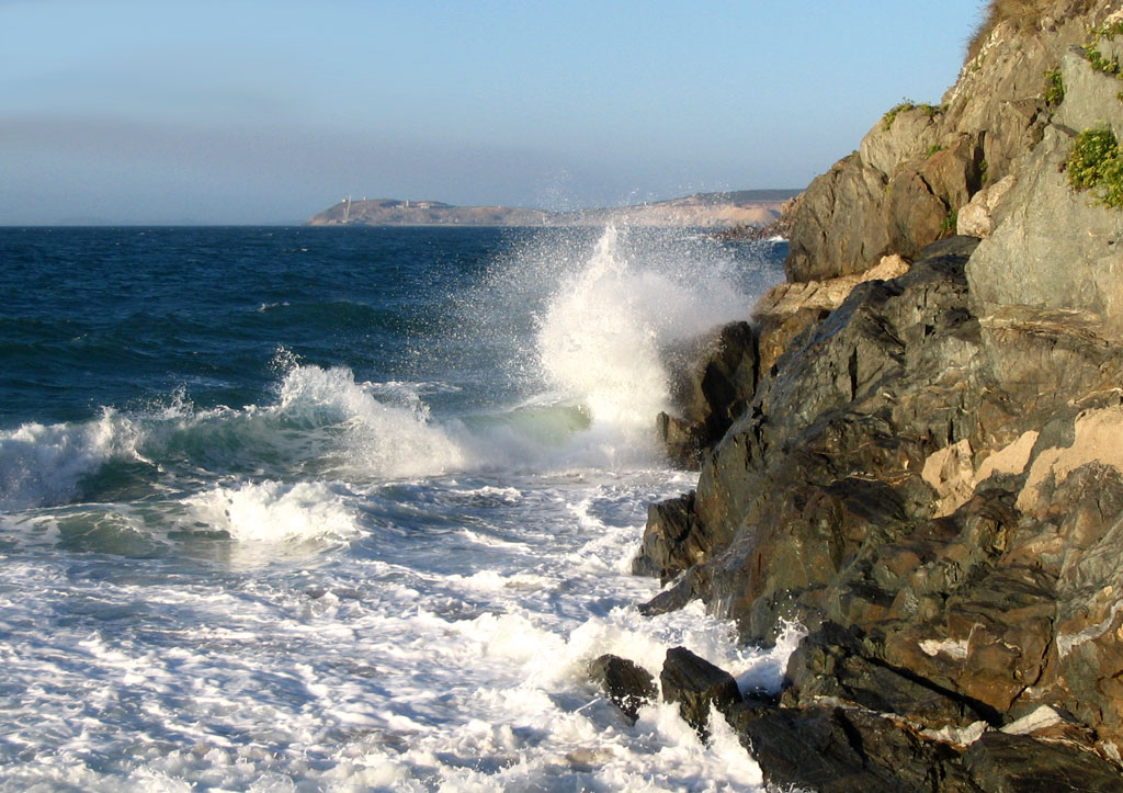 Praia de Doniños, Ferrol. Galiza